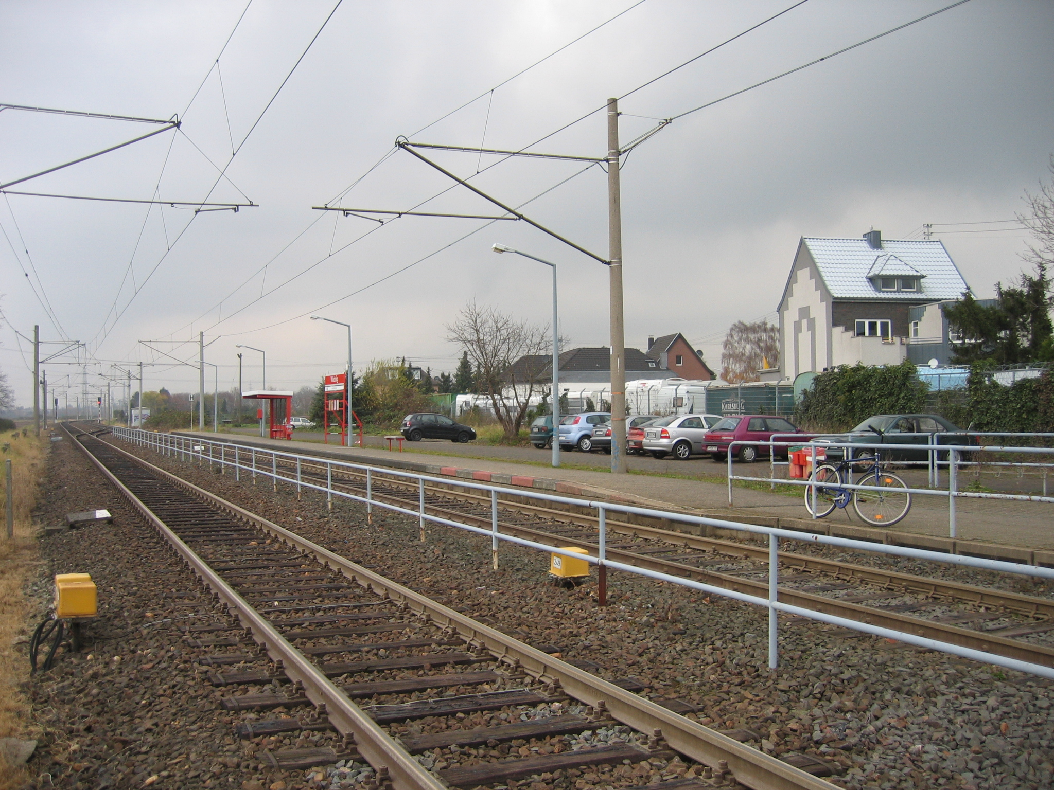 Haltestelle Widdig der Kölner Stadtbahn